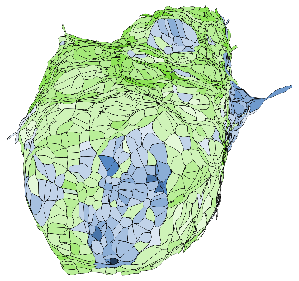 2018 台南市市長選舉各里得票人口變形圖